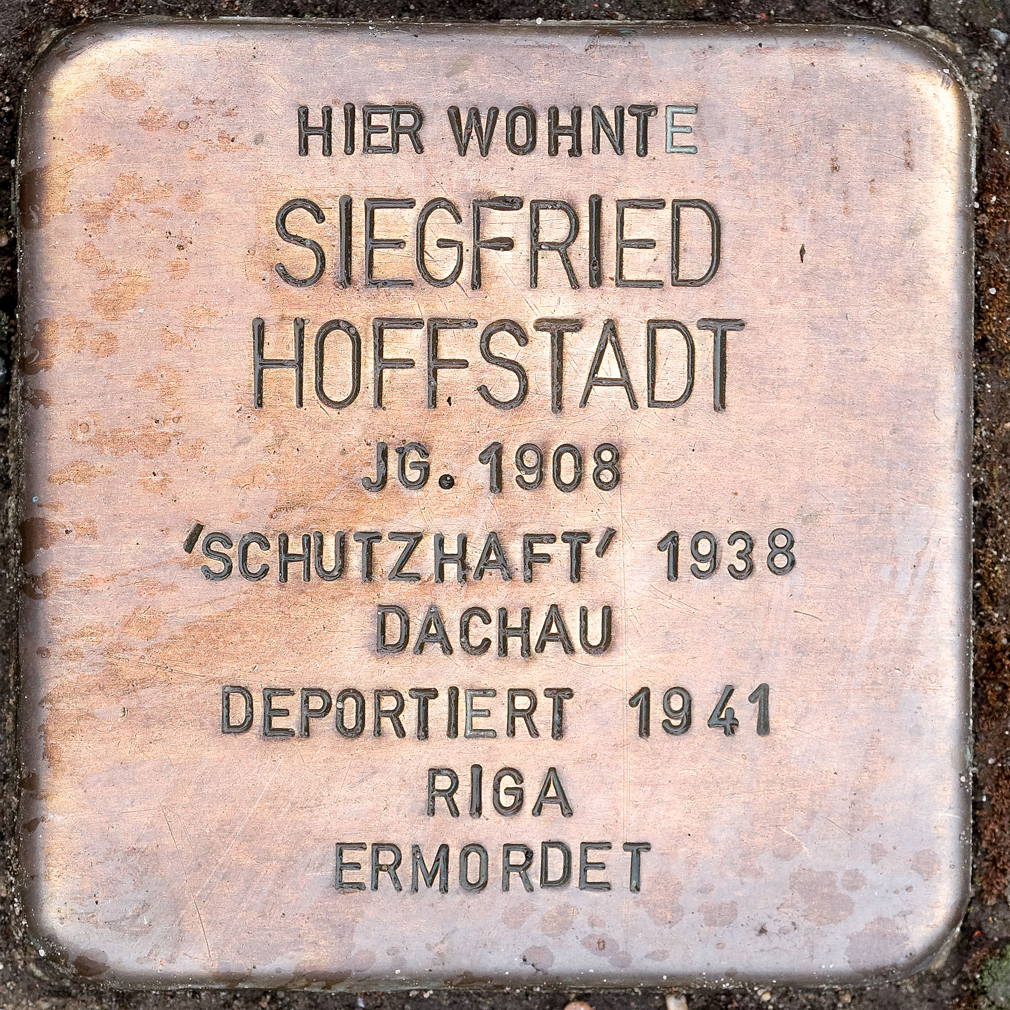 Stolpersteine Straelen: Hoffstadt, Siegfried